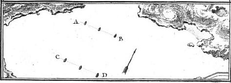 Beispiel einer Ankerordnung im Segelkriegsschiffzeitalter